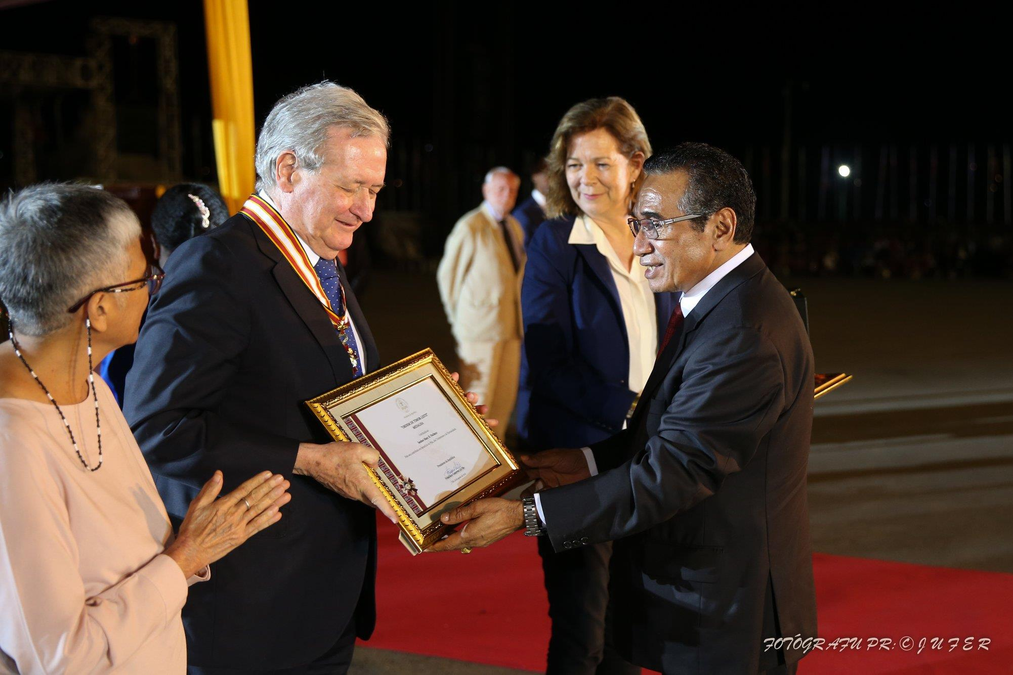 Fernando de Mendonça de Oliveira bekommt den Ordem de Timor-Leste von Francisco Guterres bei den Feierlichkeiten zum zwanzigsten Jubiläum des Unabhängigkeitsreferendums.